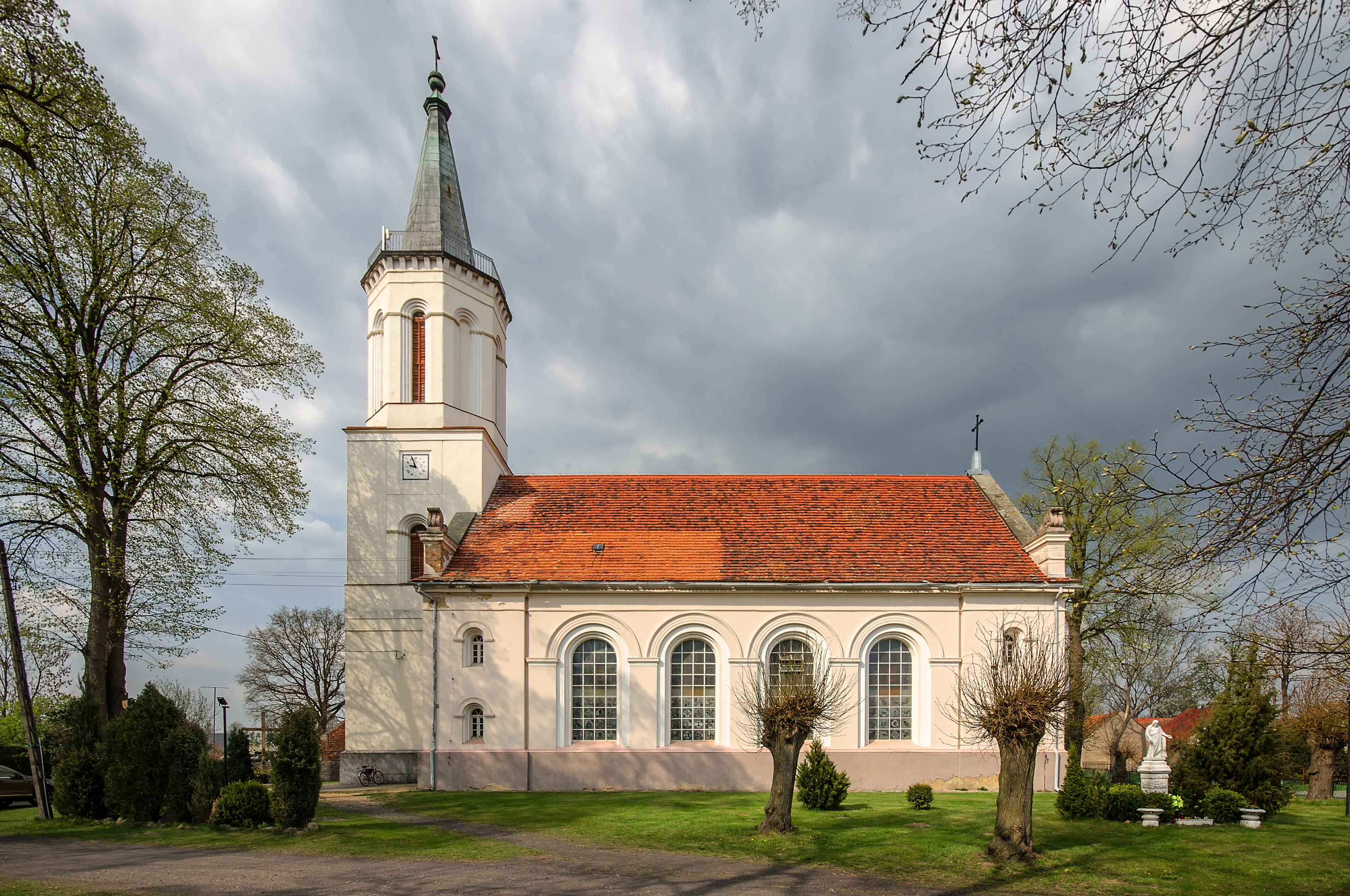 Brunów, kościół par. p.w. Podwyższenia Krzyża Św., XIV, poł. XIX